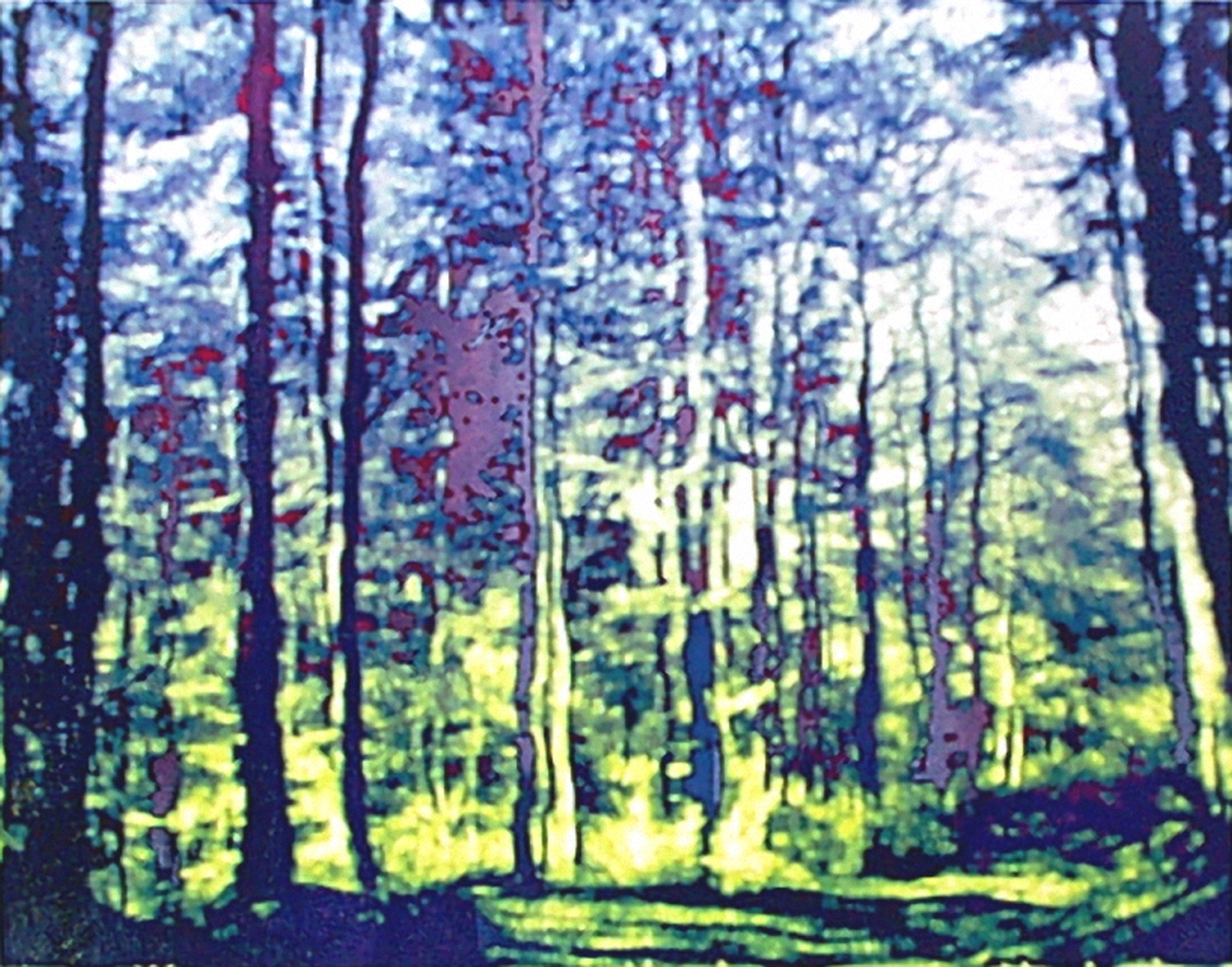 Kontraste I, Holzschnitt von Joachim Feldmeier, 2004, Auflage 5, Papierformat 50 x 60 cm, Plattenformat 37,8 x 47,8 cm, Aquarellbütten 240 g, Drucker Feldmeier